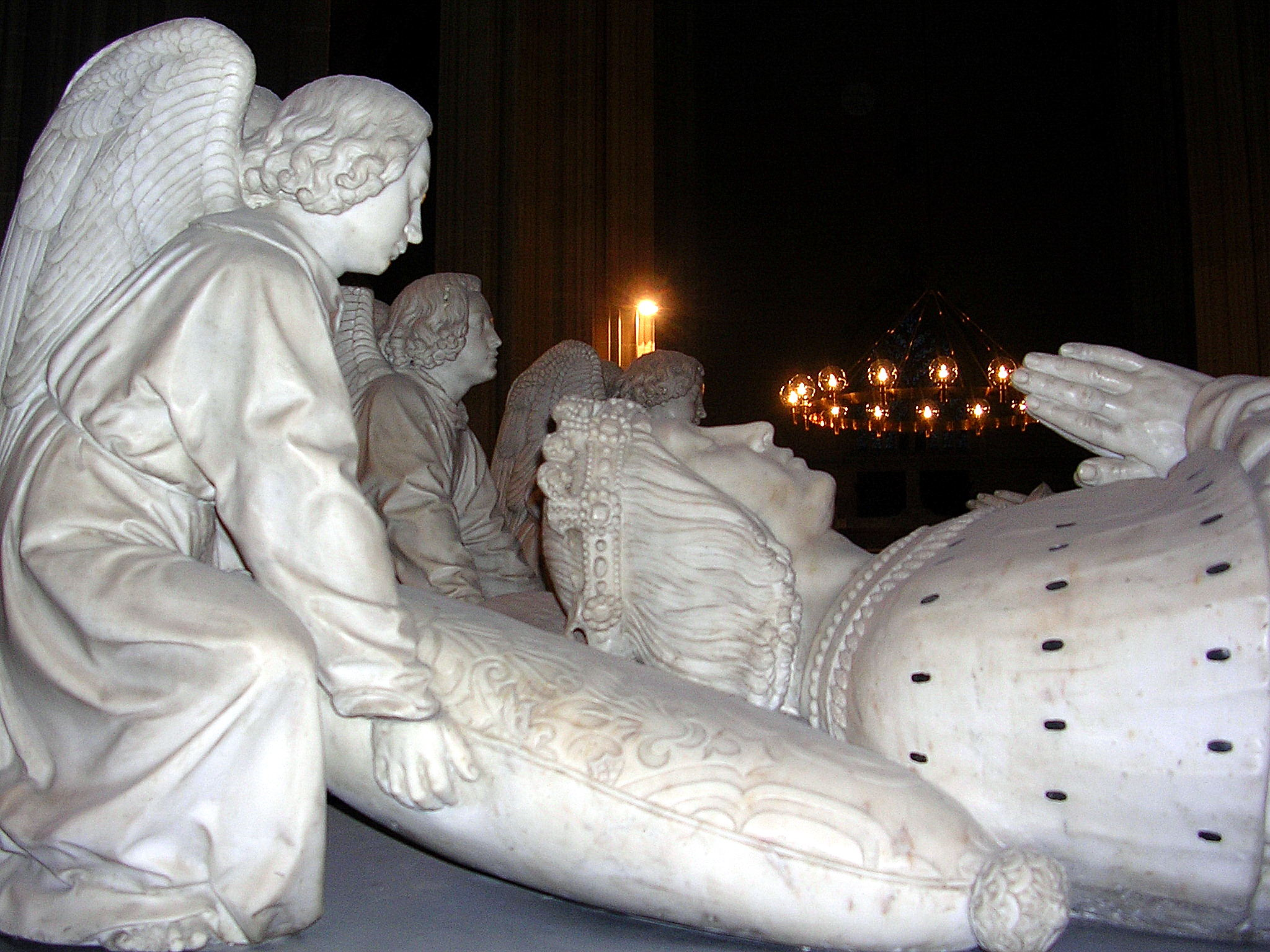 Gisant de François II, cathédrale de Nantes (France).